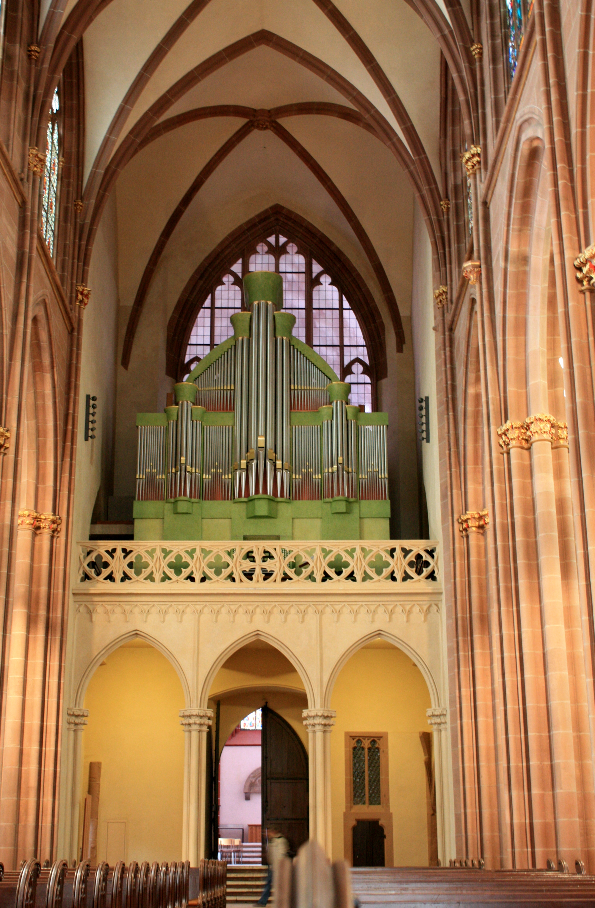 Foto der Westfassade der Oppenheimer Katharinenkirche mit Orgel von Gerald Woehl (Marburg) erbaut zwischen 2004-2006